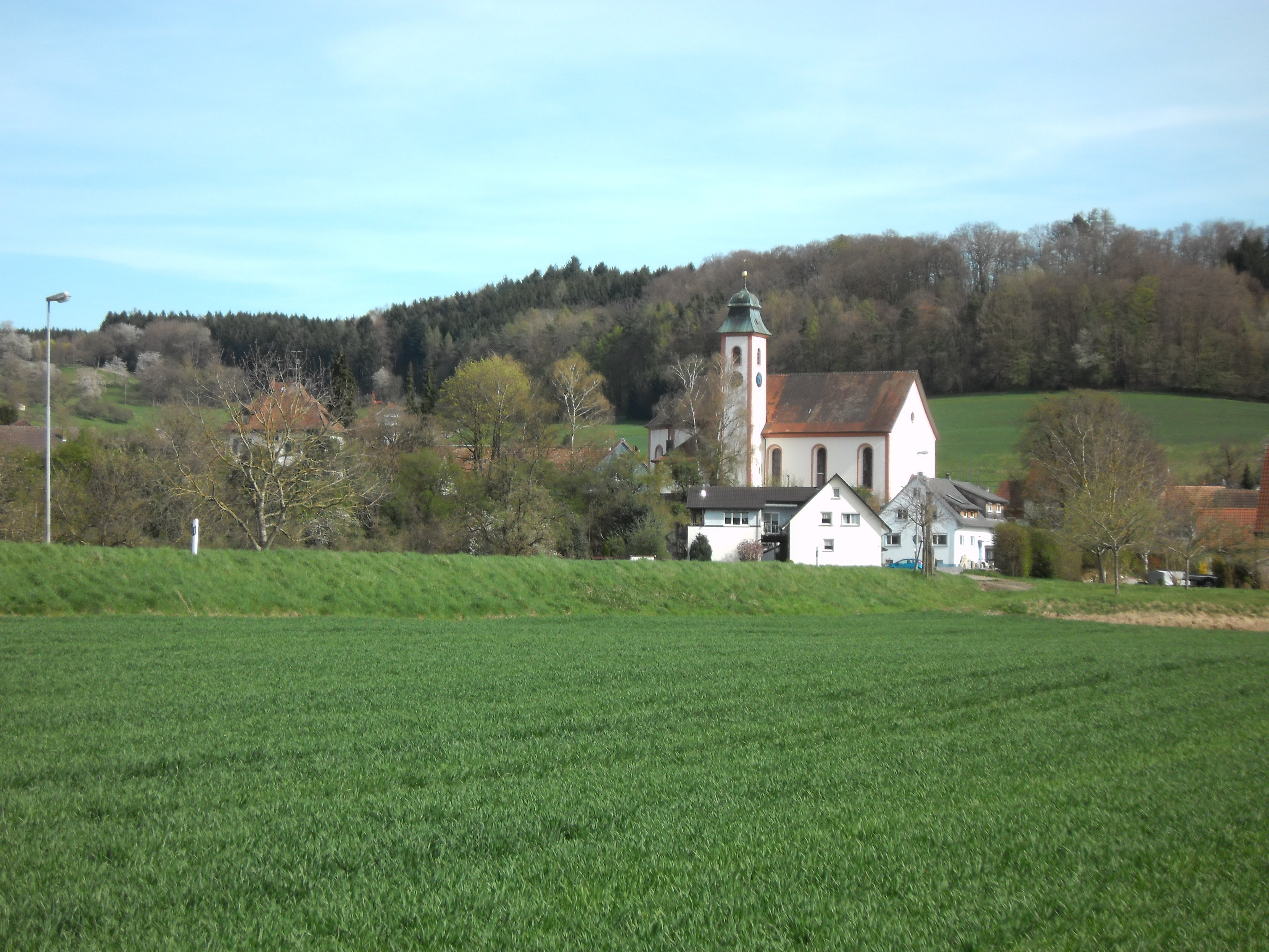 Blick auf Schwerzen